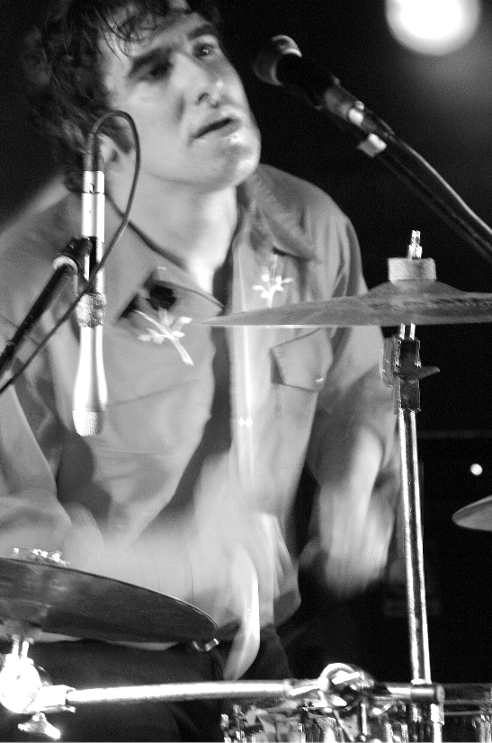 Bunnyranch - Portugal - Santa Maria da Feira - Lamas - 23 de Setembro de 2005